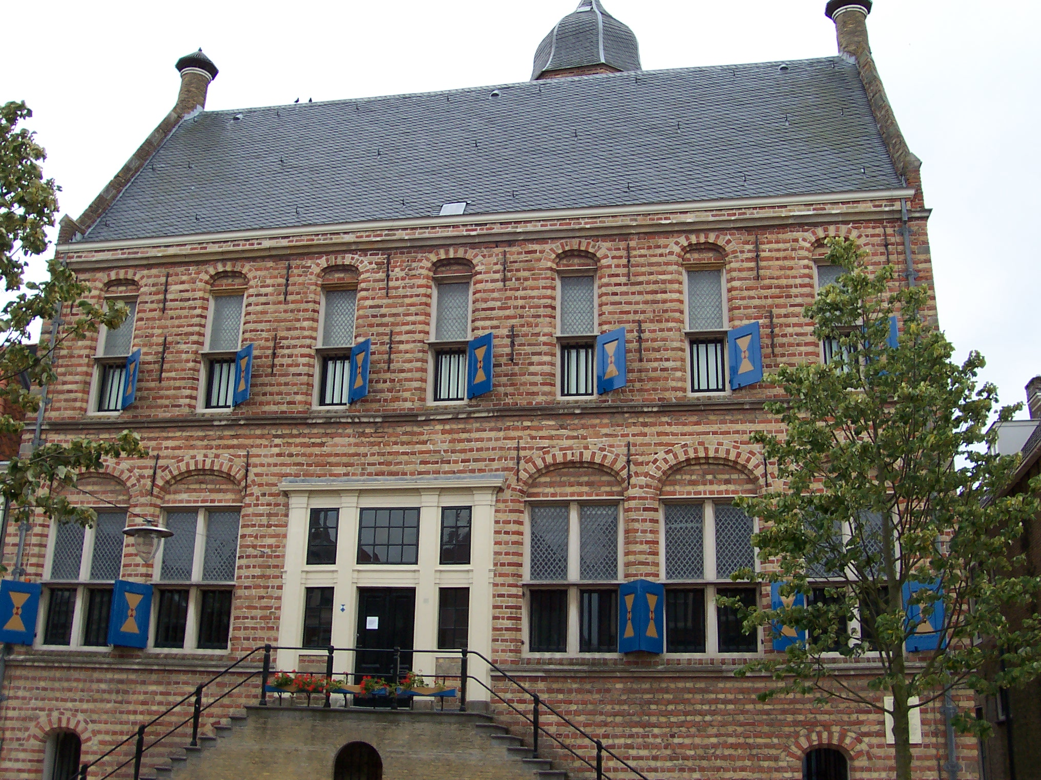 Frjentsjer, Martenastins